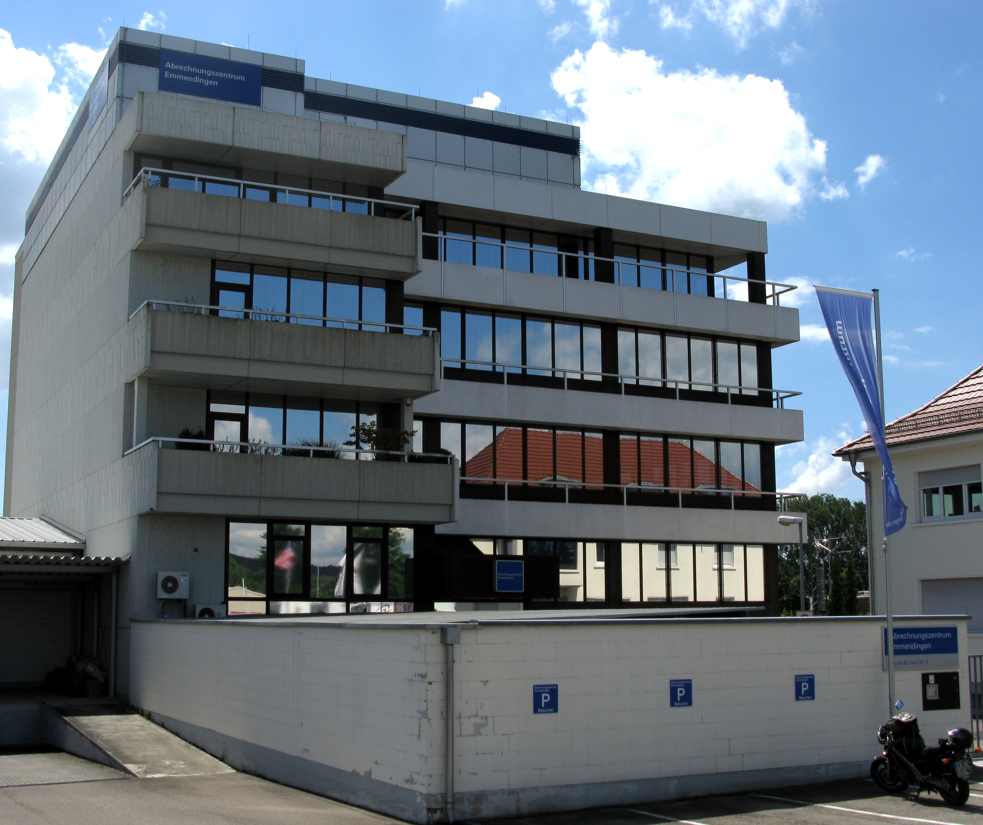 Abrechnungszentrum Emmendingen